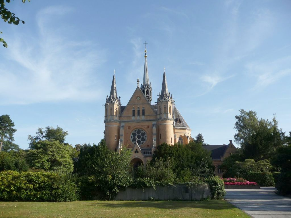 Kapelle den Hauptfriedhofs Braunschweig